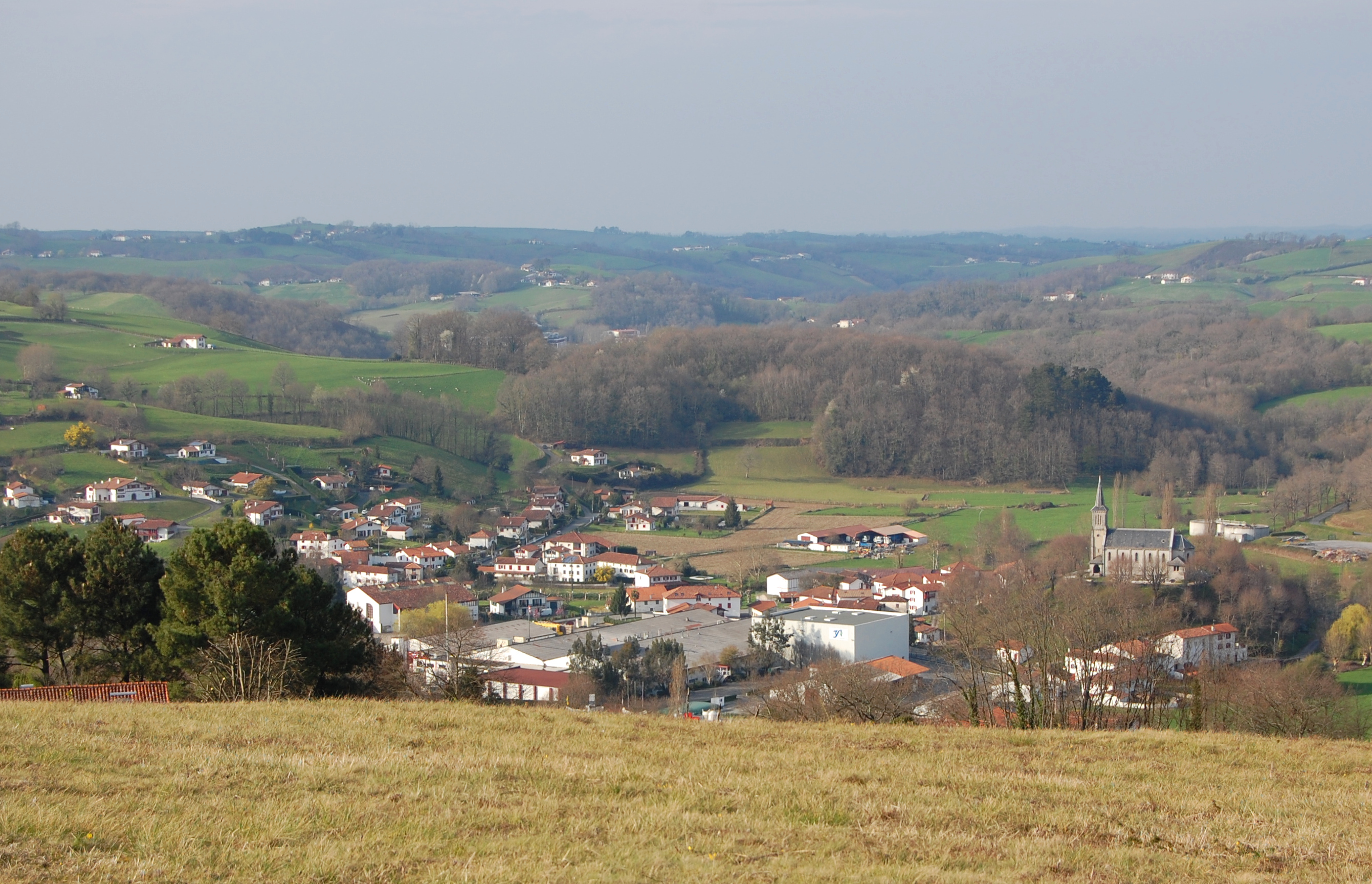 Le village de Bonloc vu de l'Agarramendi.